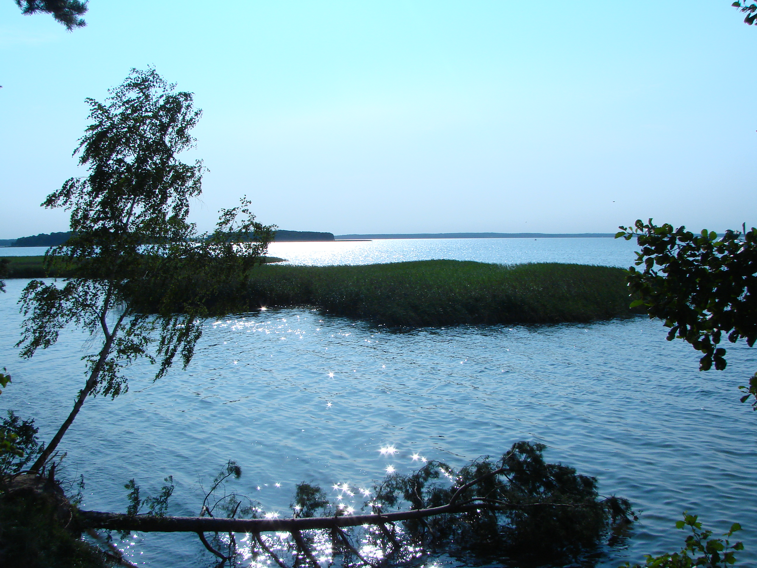 Widok z Szerokiego Ostrowia na Śniardwy, lipiec 2007, Autor zdjęcia: Robert Skulimowski